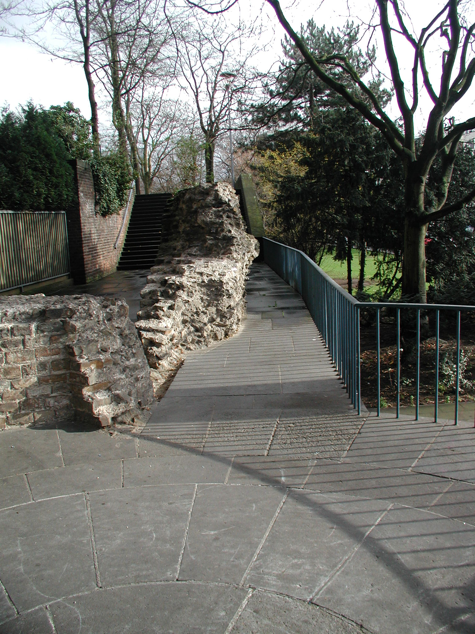 Alte Römermaue Köln, unterhalb der Kaygasse